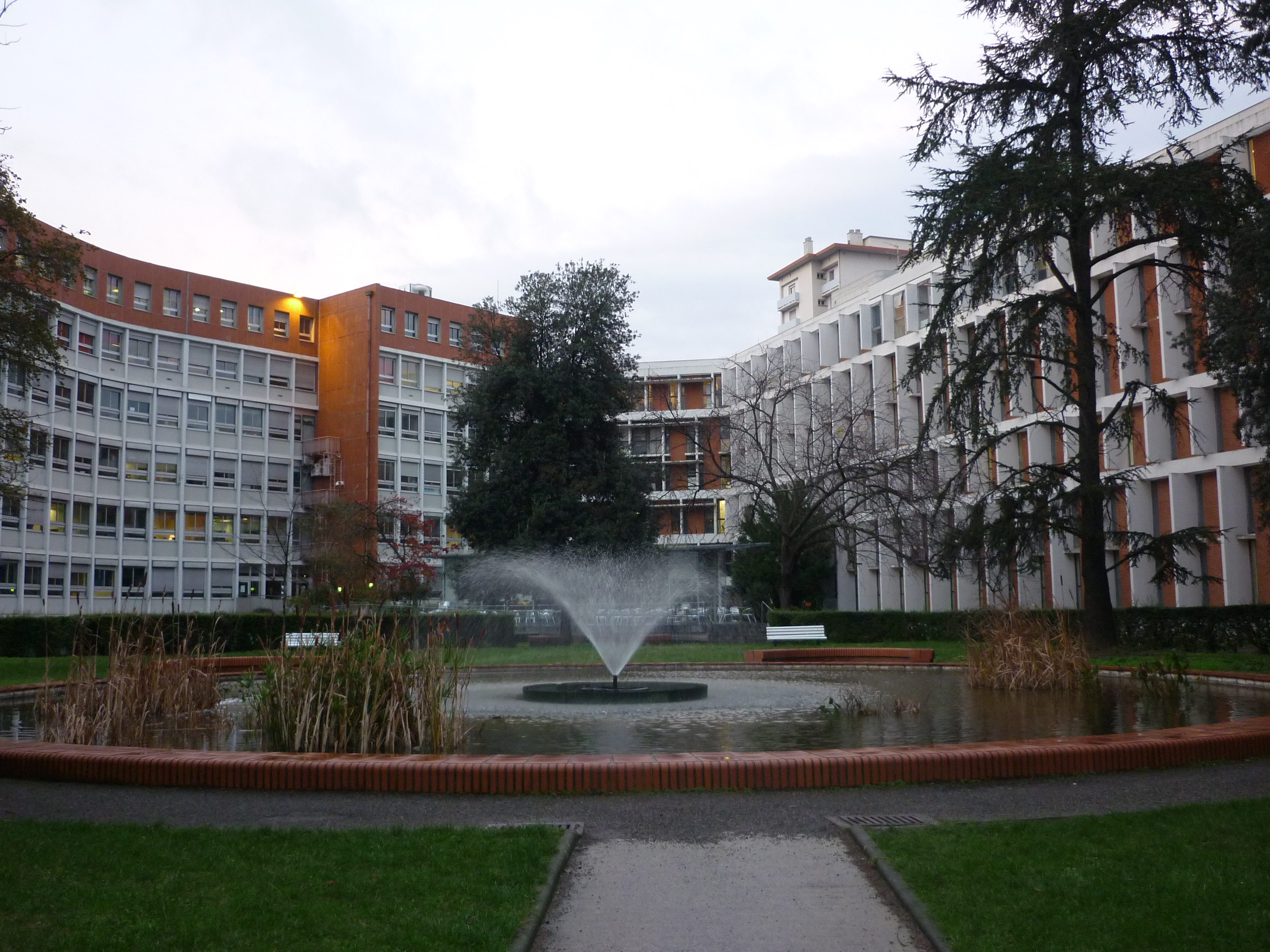 cité administrative de Toulouse, vue intérieure de la cité